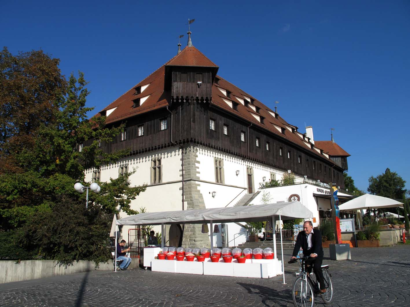 Edificio "Konzil", donde se celebró el Concilio de Constanza en el siglo XV